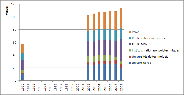 Statistiques de répartition du nombre d'ingénieurs en fonction des formations, à partir des données lues sur la page